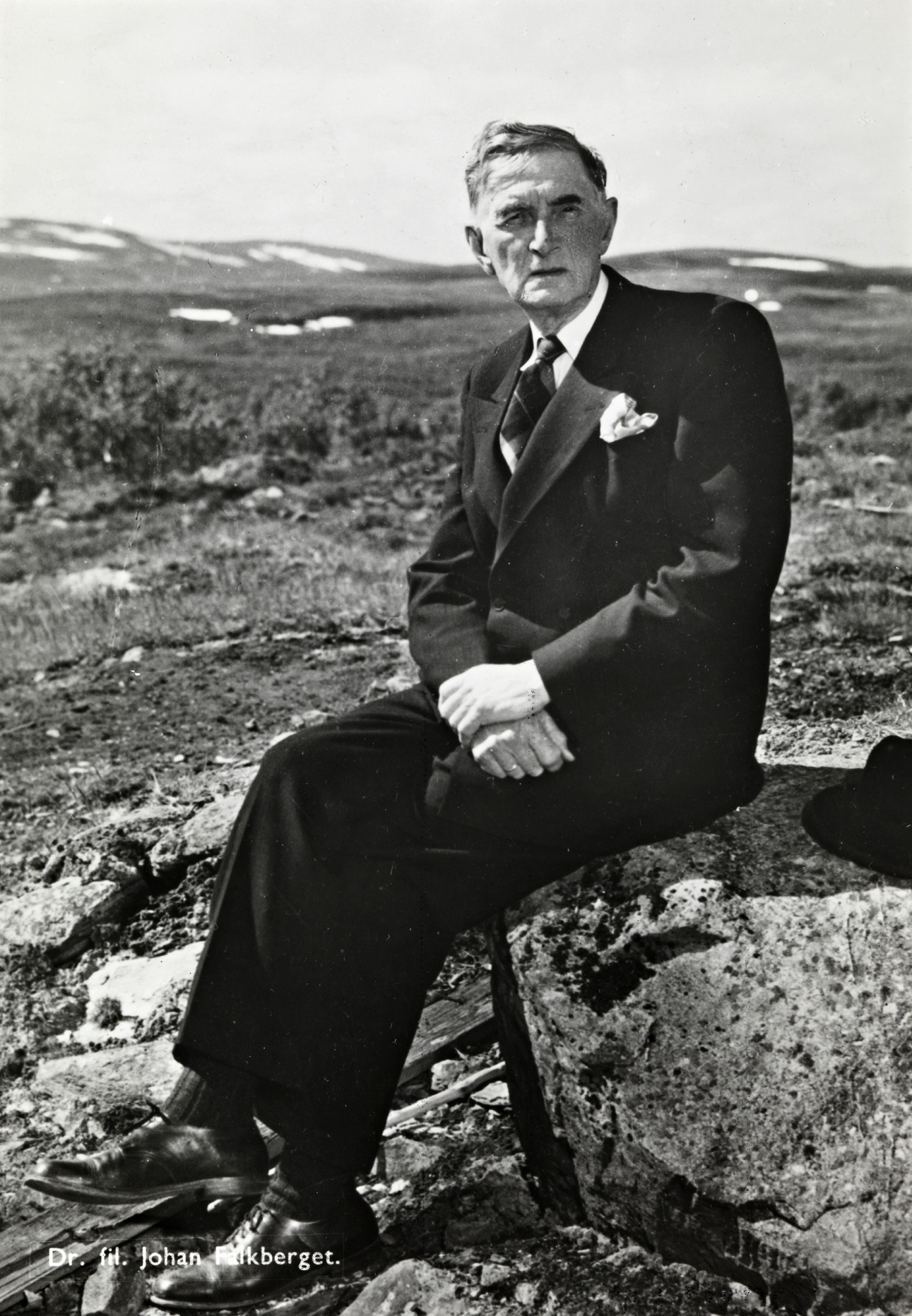 Tittel / Title: Dr. fil. Johan Falkberget Motiv / Motif: Postkort. Forfatteren, Johan Falkberget, fotografert på Rørosvidda. Dato / Date: ca 1950 Fotograf / Photographer: ukjent / unknown Utgiver / Publisher: Dahl's bokhandel, Røros Sted / Place: Sør-Trøndelag Eier / Owner Institution: Nasjonalbiblioteket / National Library of Norway Lenke / Link: Bildesignatur / Image Number: blds_04882